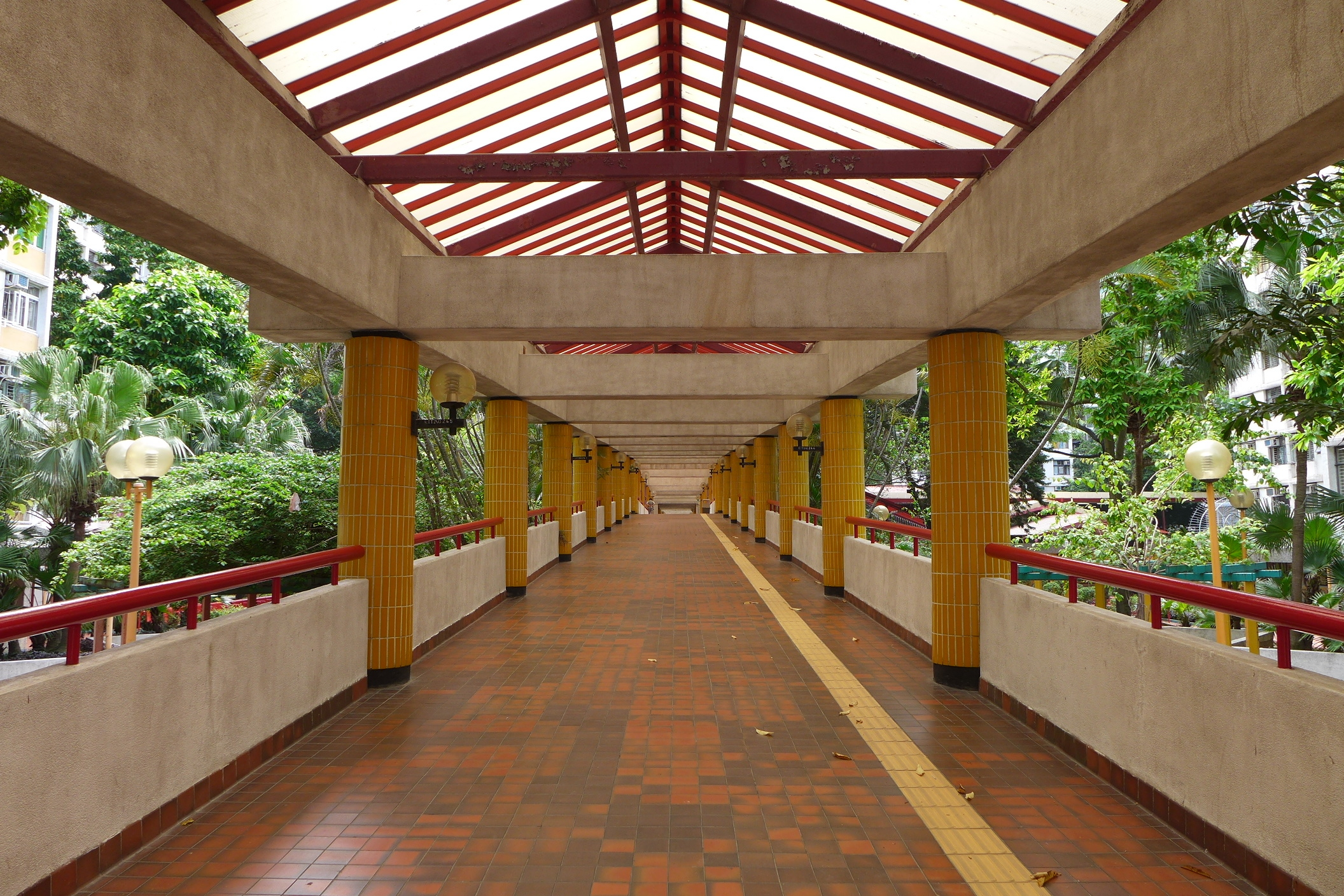 Tung Tau Estate